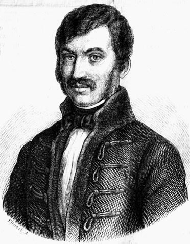 Lavotta János (1764–1820) zeneszerző, hegedűművész portréja